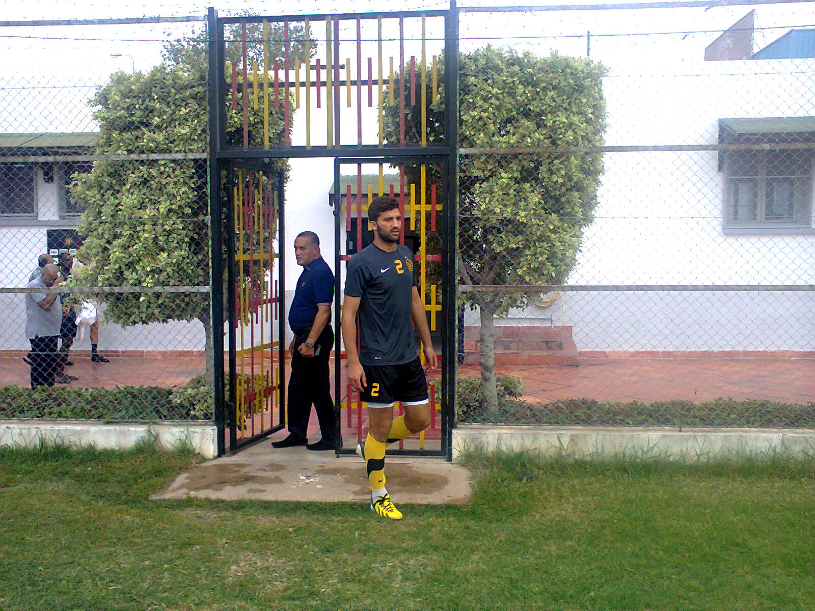 Ali Machani à l'entraînement